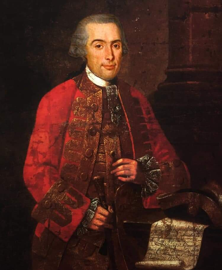 Portrait of Luís de Albuquerque de Melo Pereira e Cáceres (1739-1797)